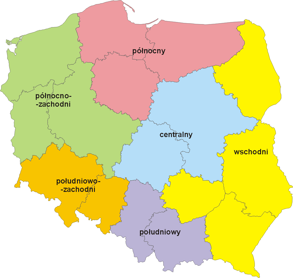 Polska – jednostki NUTS 1 oraz NTS 3 (regiony) wg podziału obowiązującego od 26 listopada 2005 roku do 31 grudnia 2017 roku dla NUTS oraz od 1 maja 2004 roku do 31 grudnia 2017 roku dla NTS